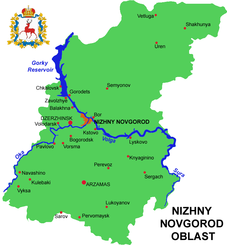 Nizhny Novgorod Oblast map